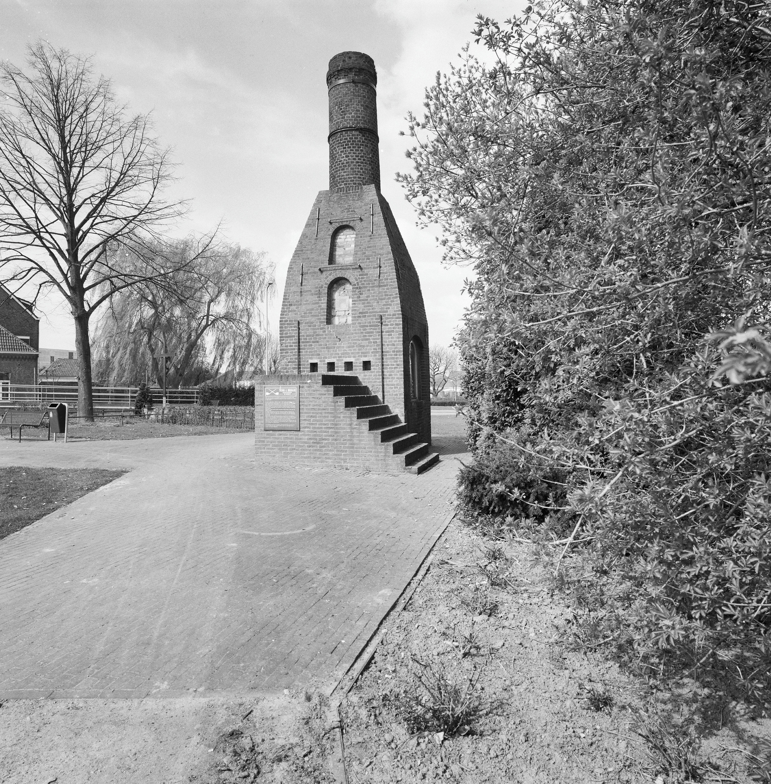 Kleipijpenoven: Overzicht bakstenen oven